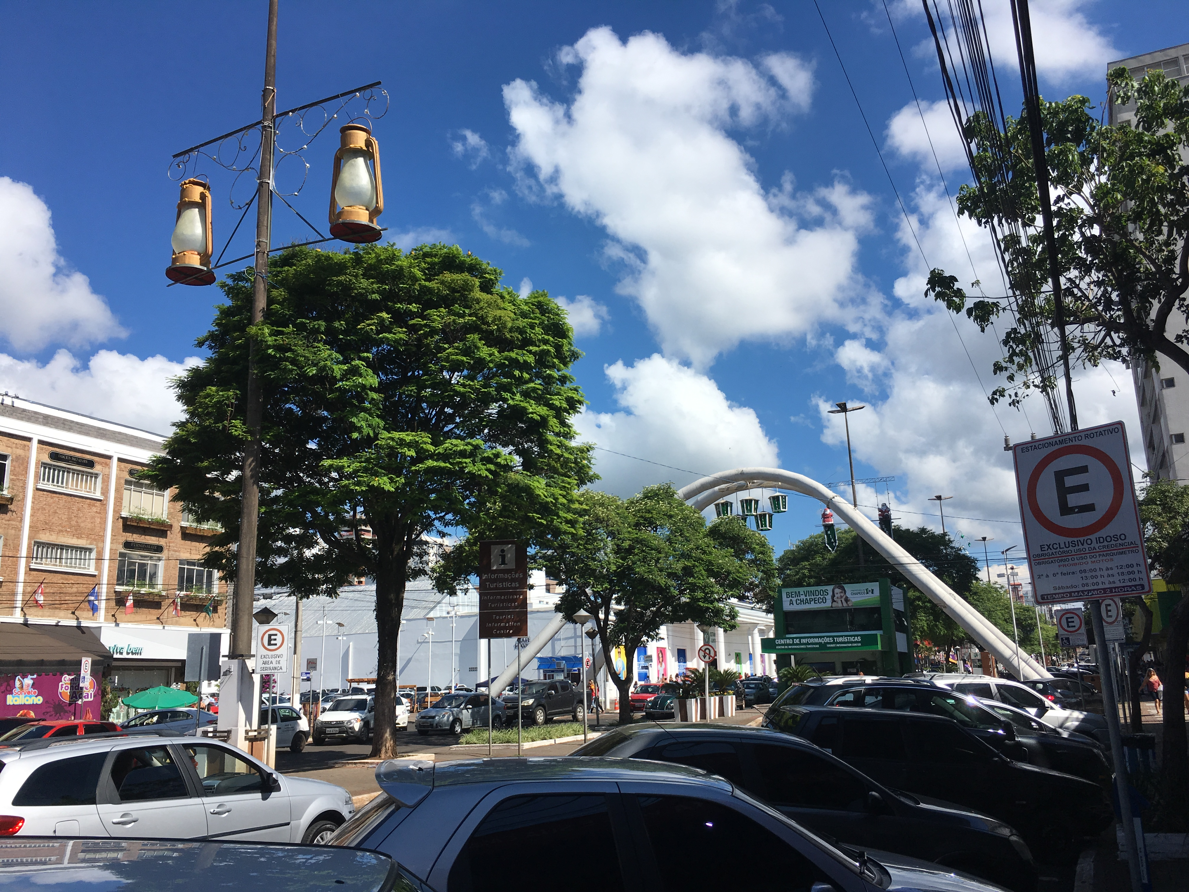 Calçadão.